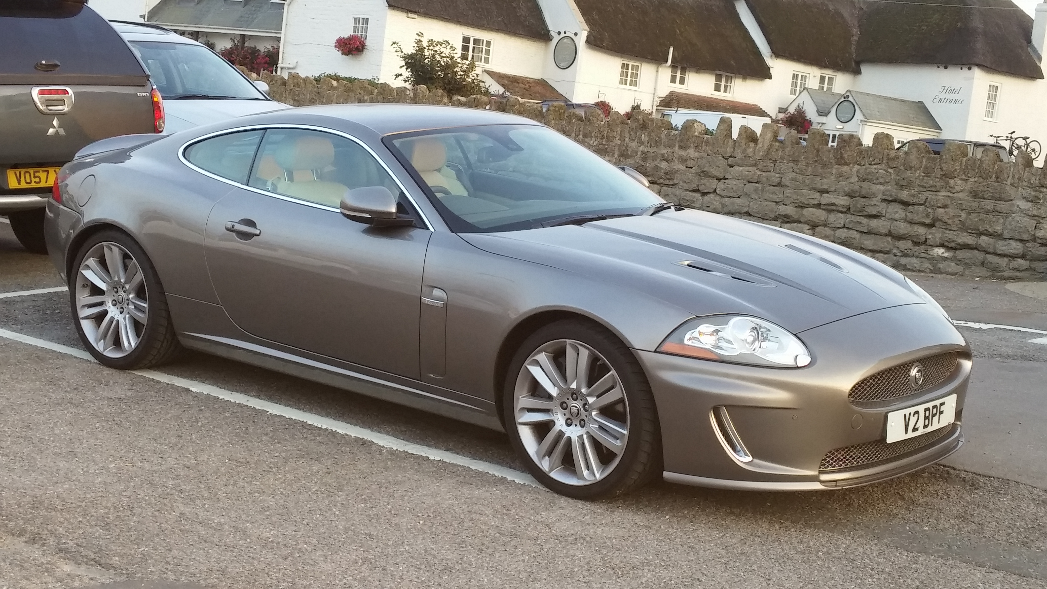 Jaguar XK R (2009)